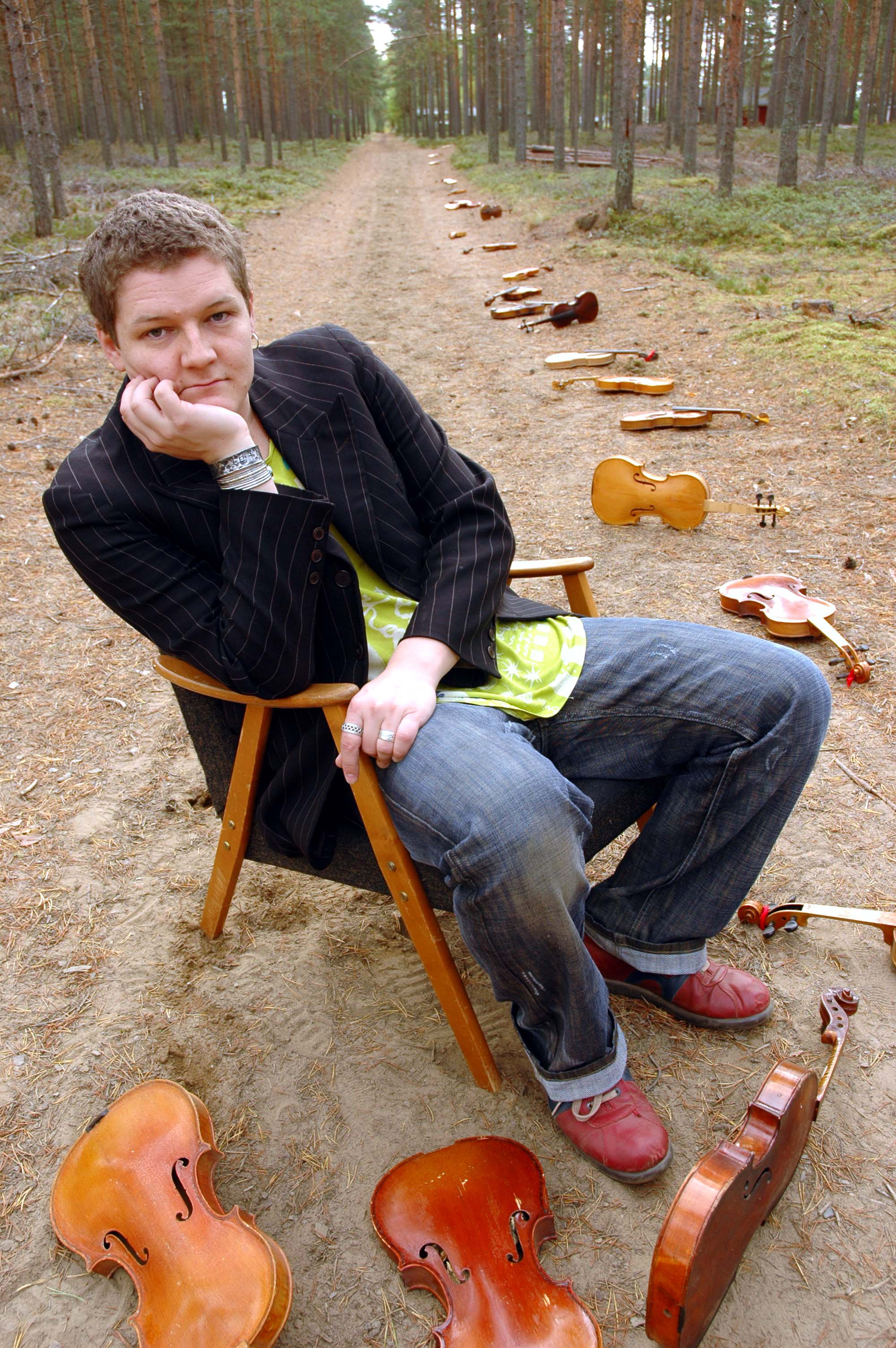 Ville Kangas